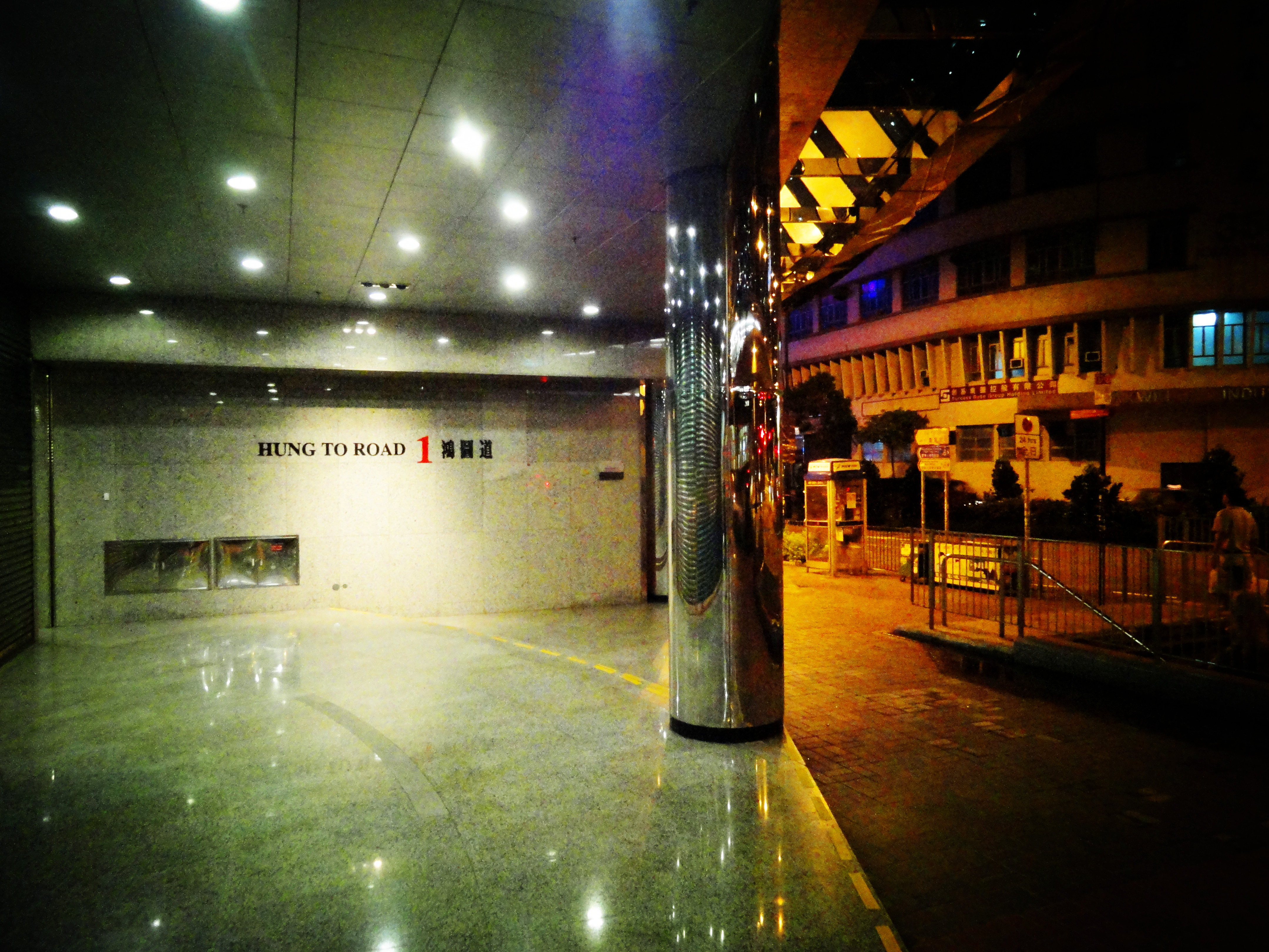 中文（中国大陆）: 鸿图道1号